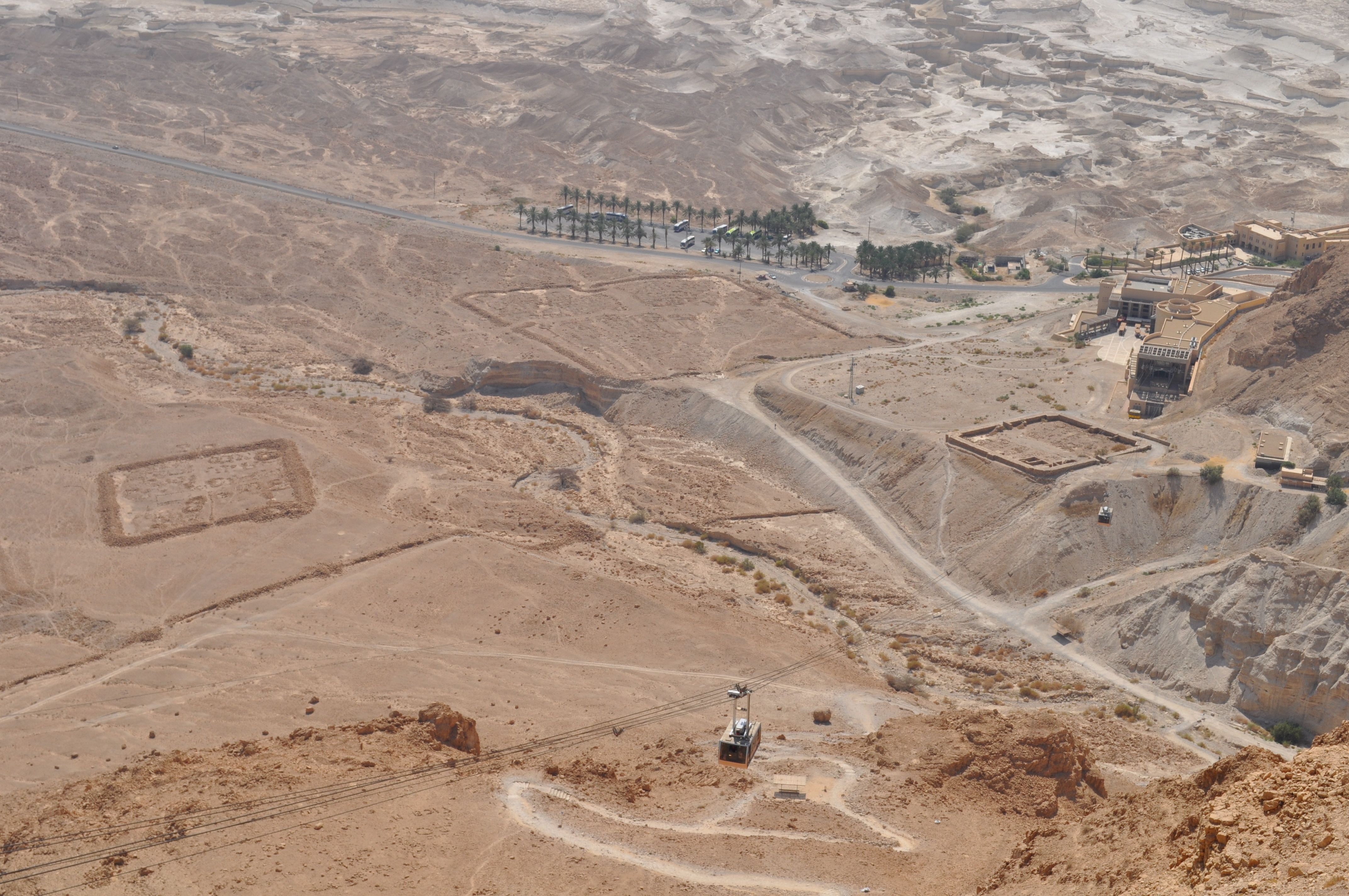 Masada, roman camps (castra) A, B and C.